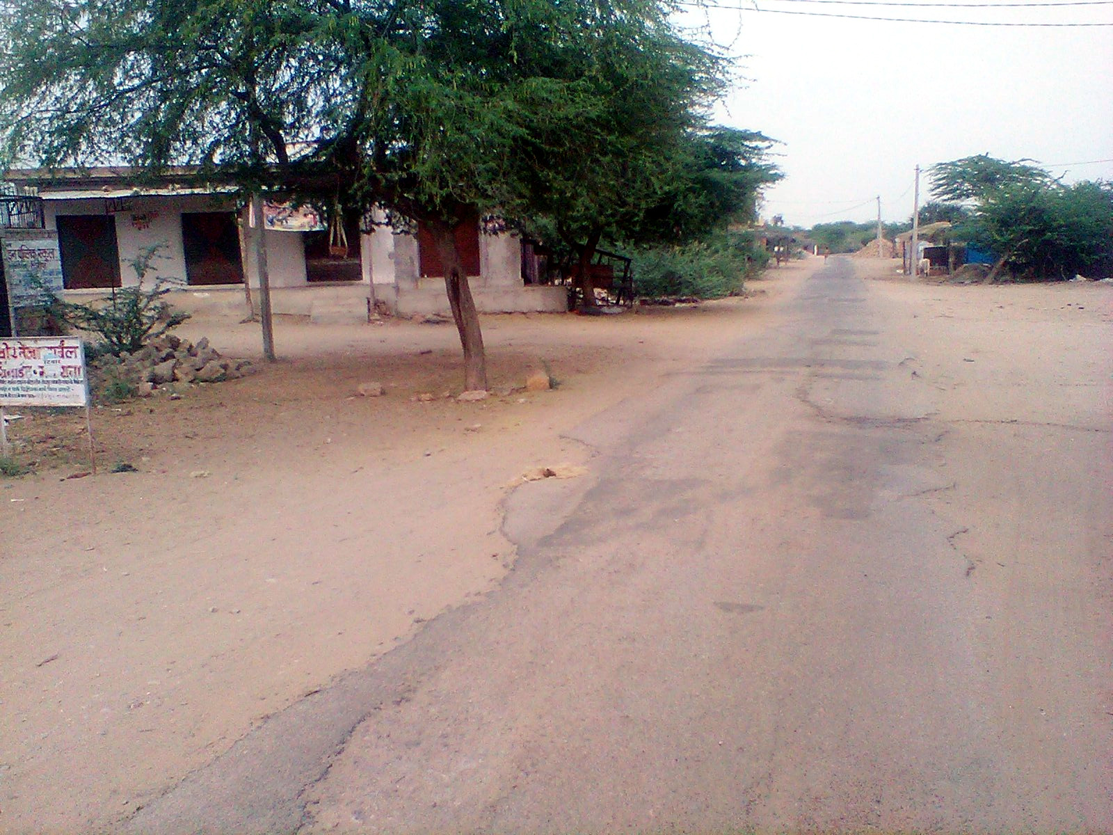 केलनसर kelansar